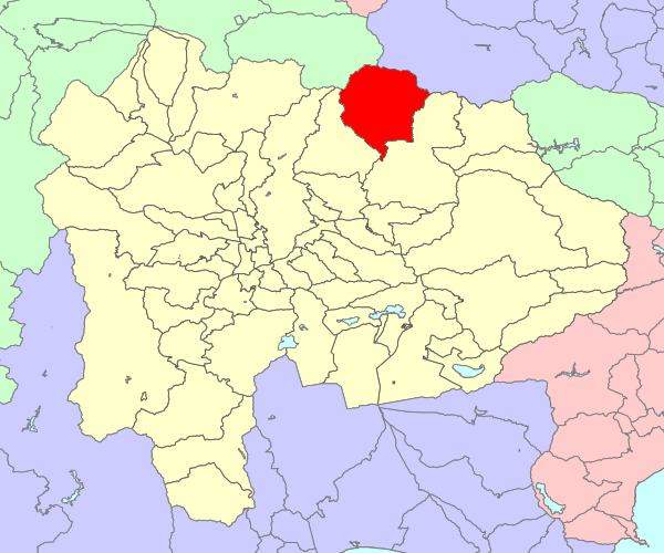 山梨県東山梨郡三富村の位置画像。